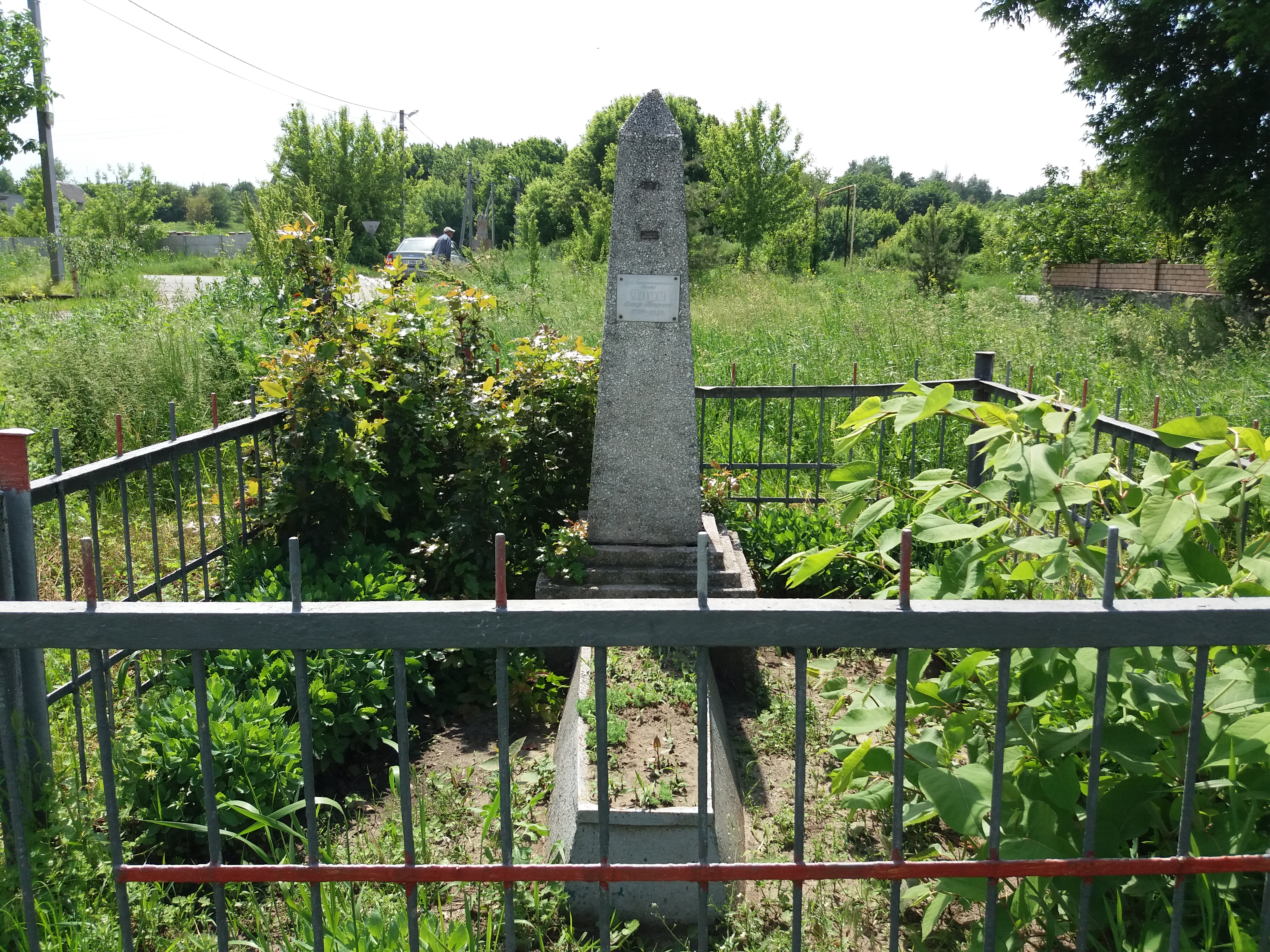 Могила Захара Петровича Ялова (1870—1923) — чемпіона світу з вільної боротьби